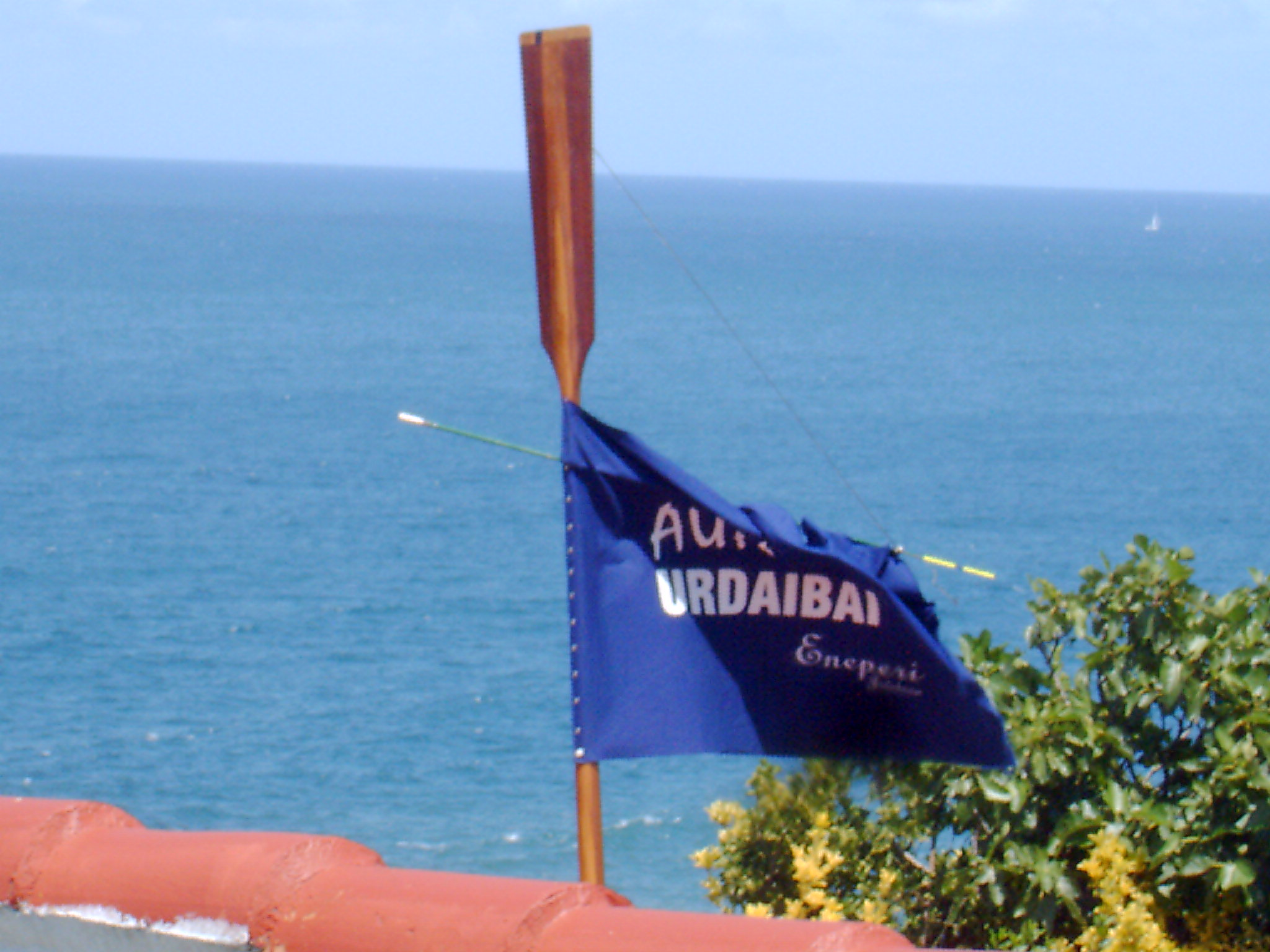 Urdaibai arraun taldea animatzeko bandera